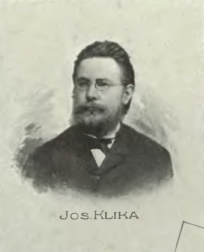 Portrét – Josef Klika (1857-1906), Český pedagog